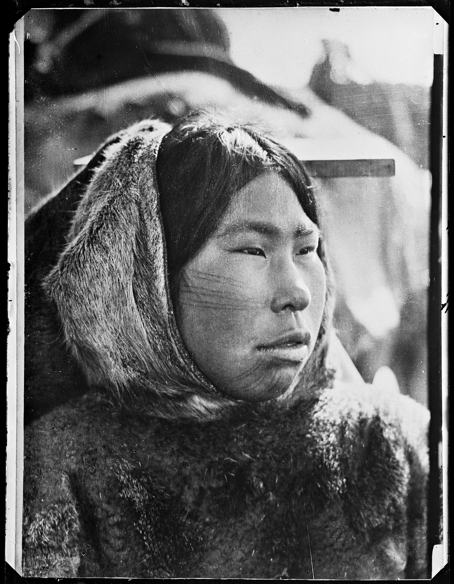 Tittel / Title: Kabloka, Netsilik-inuit Motiv / Motif: Glassnegativ 13x18 cm. Den 17årige Kabloka var kona til "Uglen". Dato / Date: 1903-1905 Fotograf / Photographer: Godfred Hansen (1876-1937) Sted / Place: Canada Eier / Owner Institution: Nasjonalbiblioteket / National Library of Norway Lenke / Link: Bildesignatur / Image Number: bldsa_NPRA1252